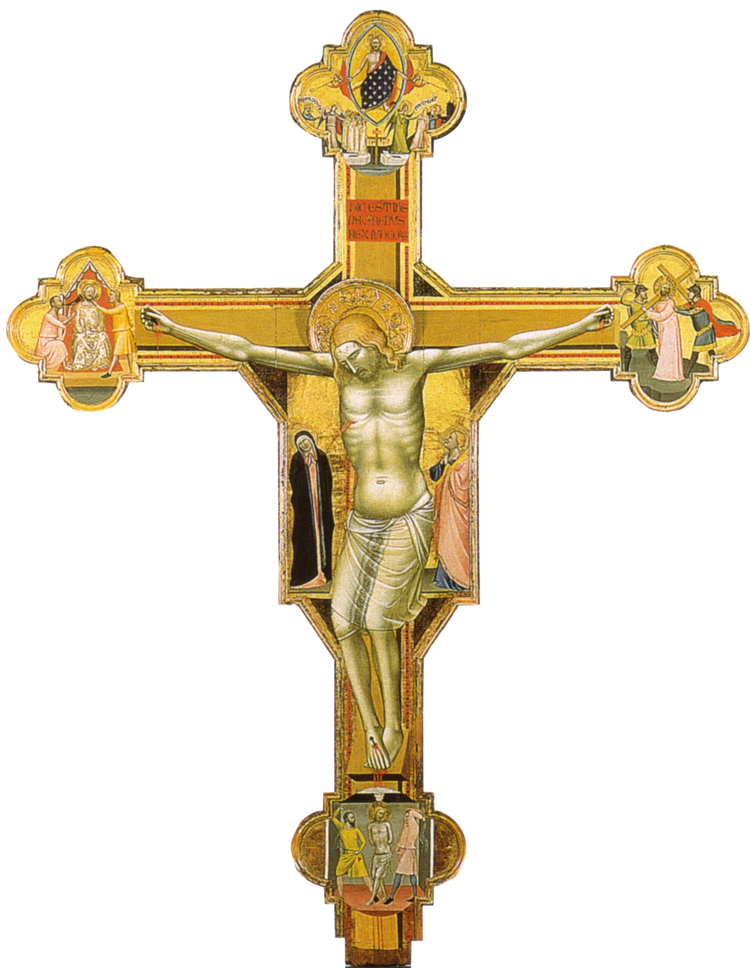 Barnardo daddi, crocifisso sagomato